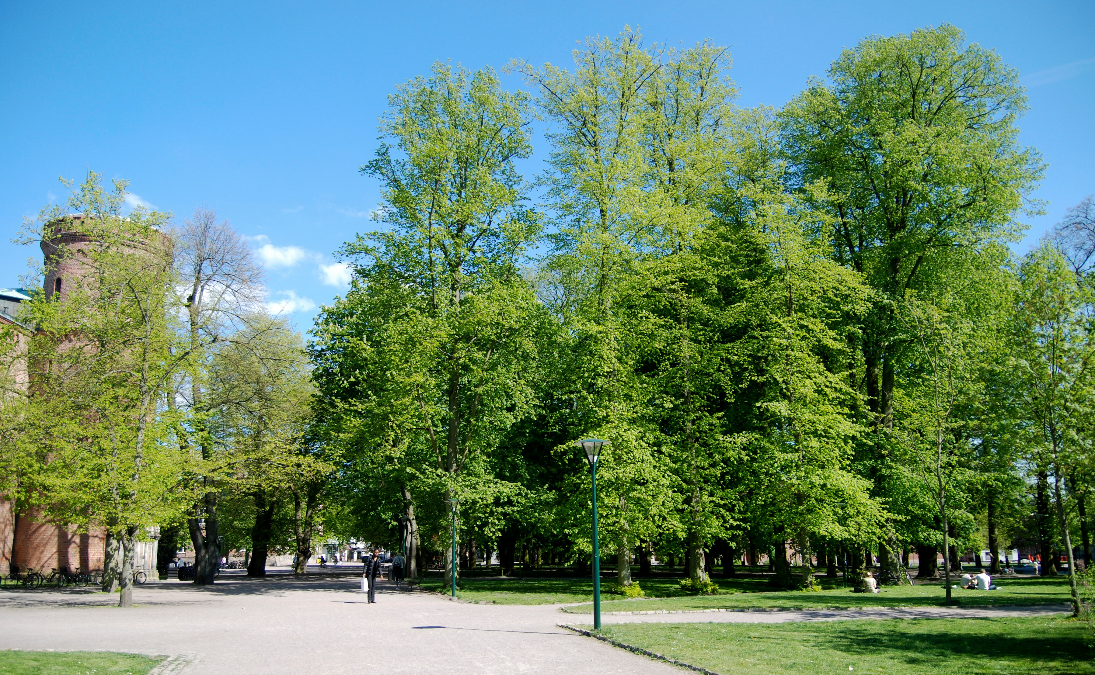 Parken Lundagård, Lund